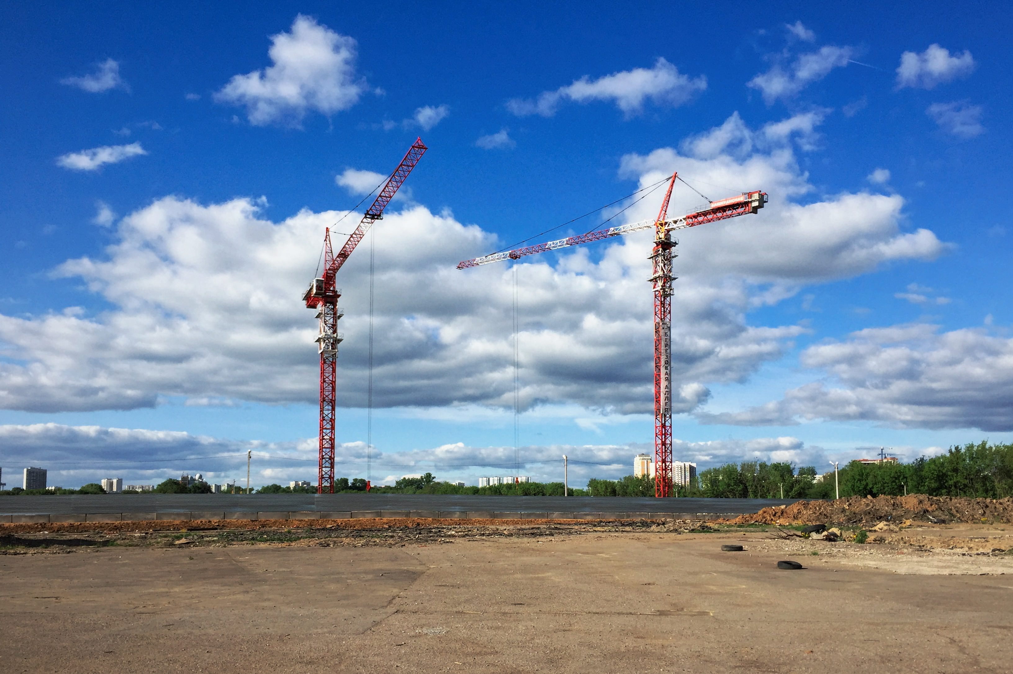 Берёзовая аллея. Строительная площадка комплекса «Берёзовая аллея» и Центра водного спорта «Динамо». Бывшая производственно-складская территория ВДНХ